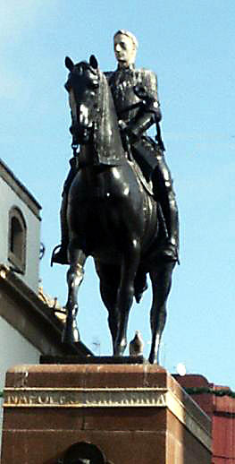 Monumento a Gonzalo Fernández de Córdoba, el Gran Capitán, obra de Mateo Inurria, en la Plaza de las Tendillas, en Córdoba, España.